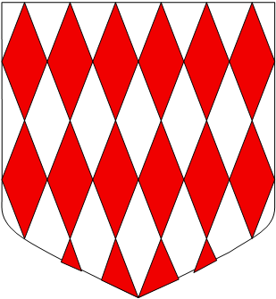 Fuselé d'argent et de gueules, qui est de Monaco